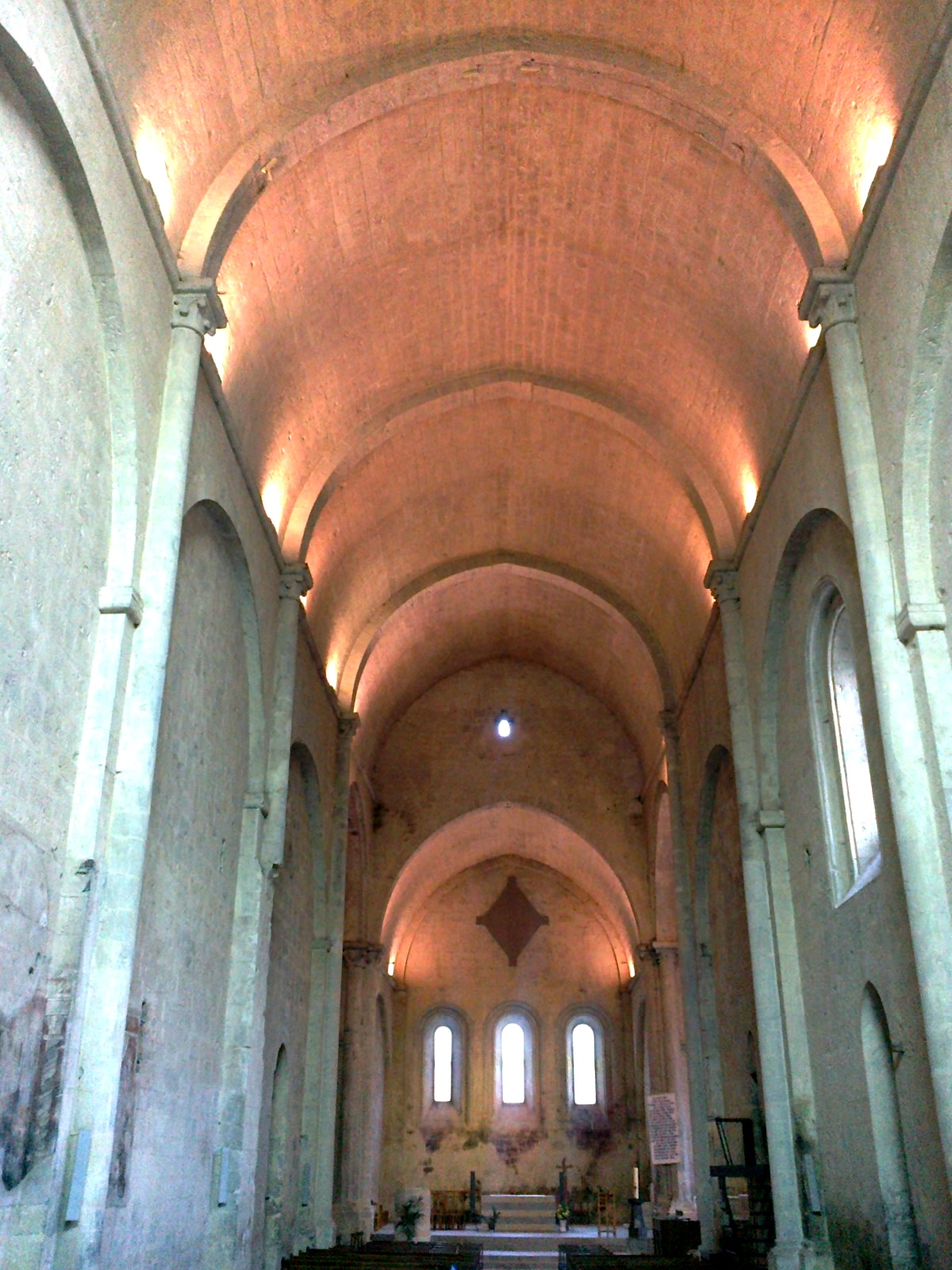 Alpes Haute Provence Digne Notre-Dame Bourg Nef 13072013